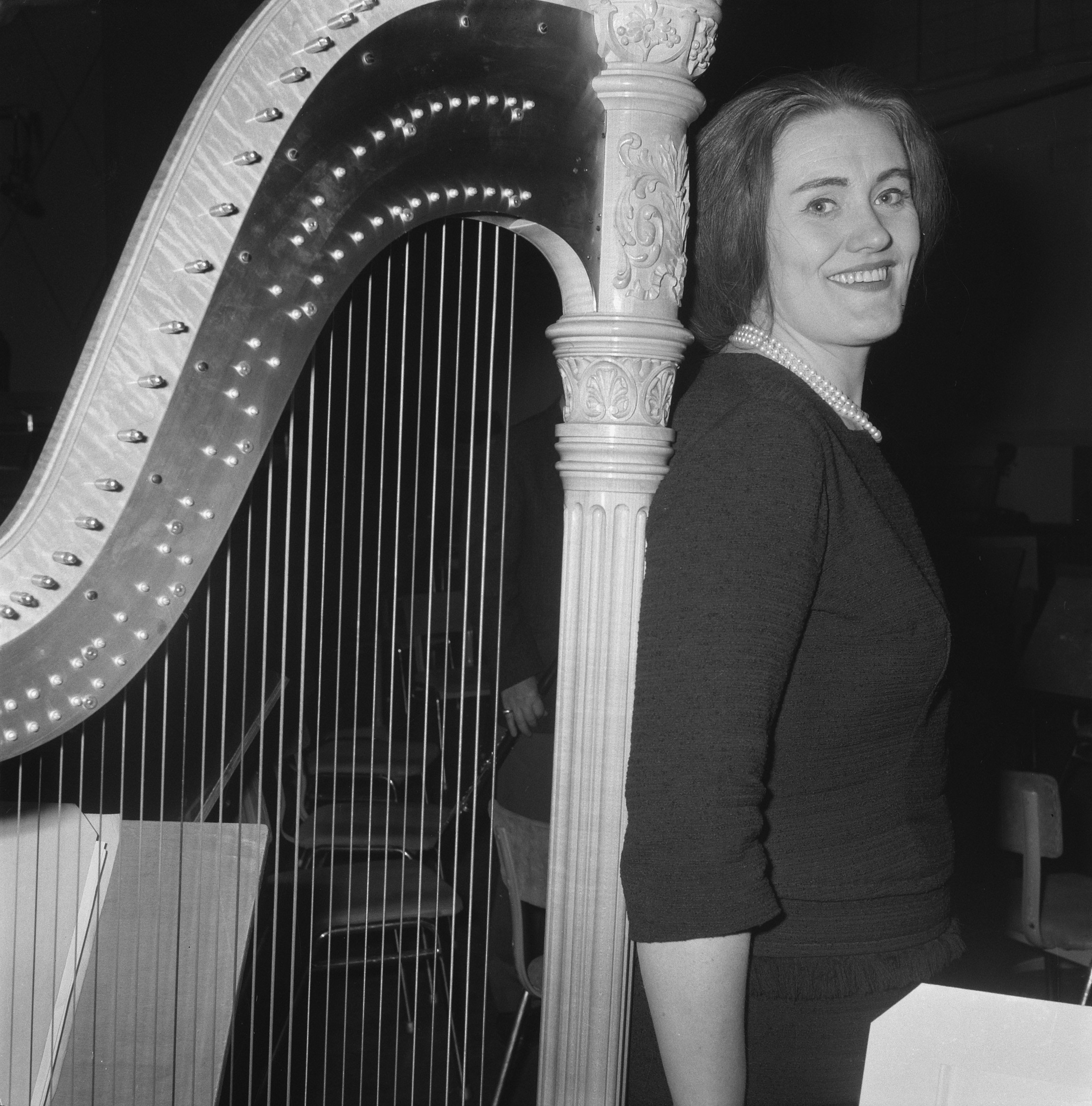 Collectie / Archief : Fotocollectie Anefo Reportage / Serie : [ onbekend ] Beschrijving : Joan Sutherland in Concertgebouw onder leiding van Fulvio Vernizzi (dirigent) Datum : 25 februari 1962 Trefwoorden : CONCERTGEBOUWEN, dirigenten Persoonsnaam : Fulvio Vernizzi, Joan Sutherland Fotograaf : Nijs, Jac. de / Anefo Auteursrechthebbende : Nationaal Archief Materiaalsoort : Negatief (zwart/wit) Nummer archiefinventaris : bekijk toegang 2.24.01.03 Bestanddeelnummer : 913-5584